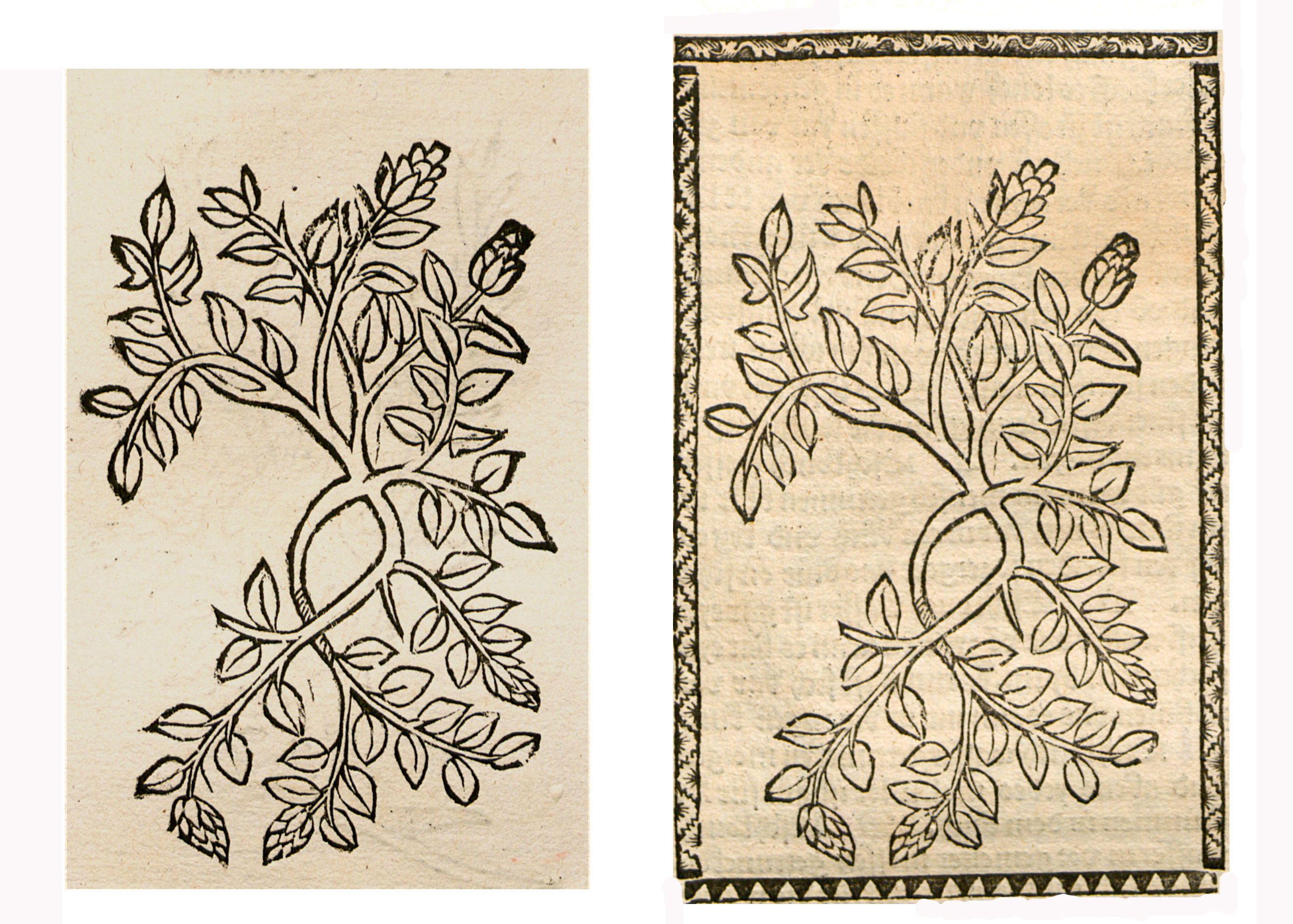 Abbildung von: Ehrenpreis